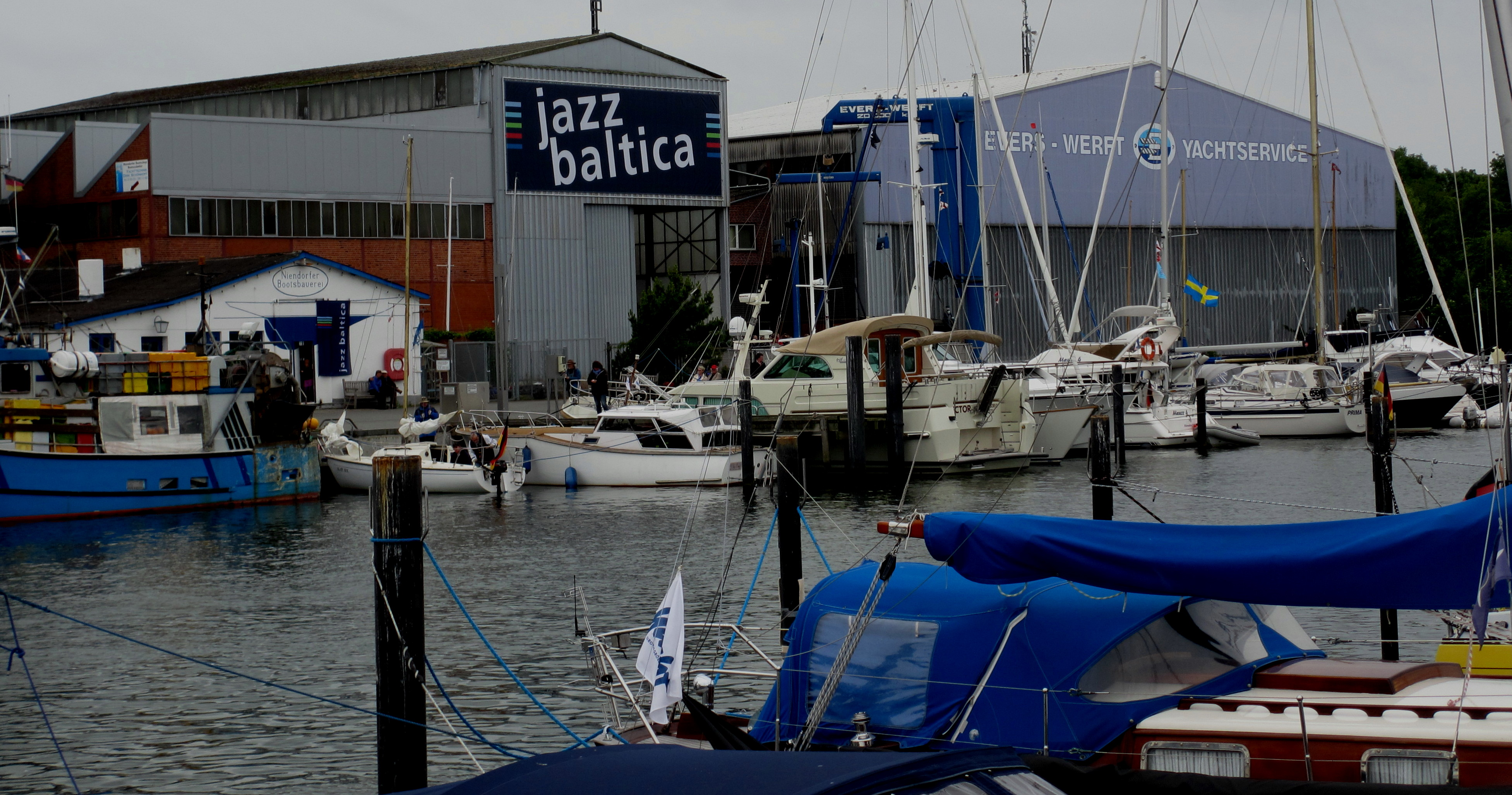 Hallen der Evers-Werft in Niendorf (Timmendorfer Strand), Spielstätten von jazz baltica seit 2012